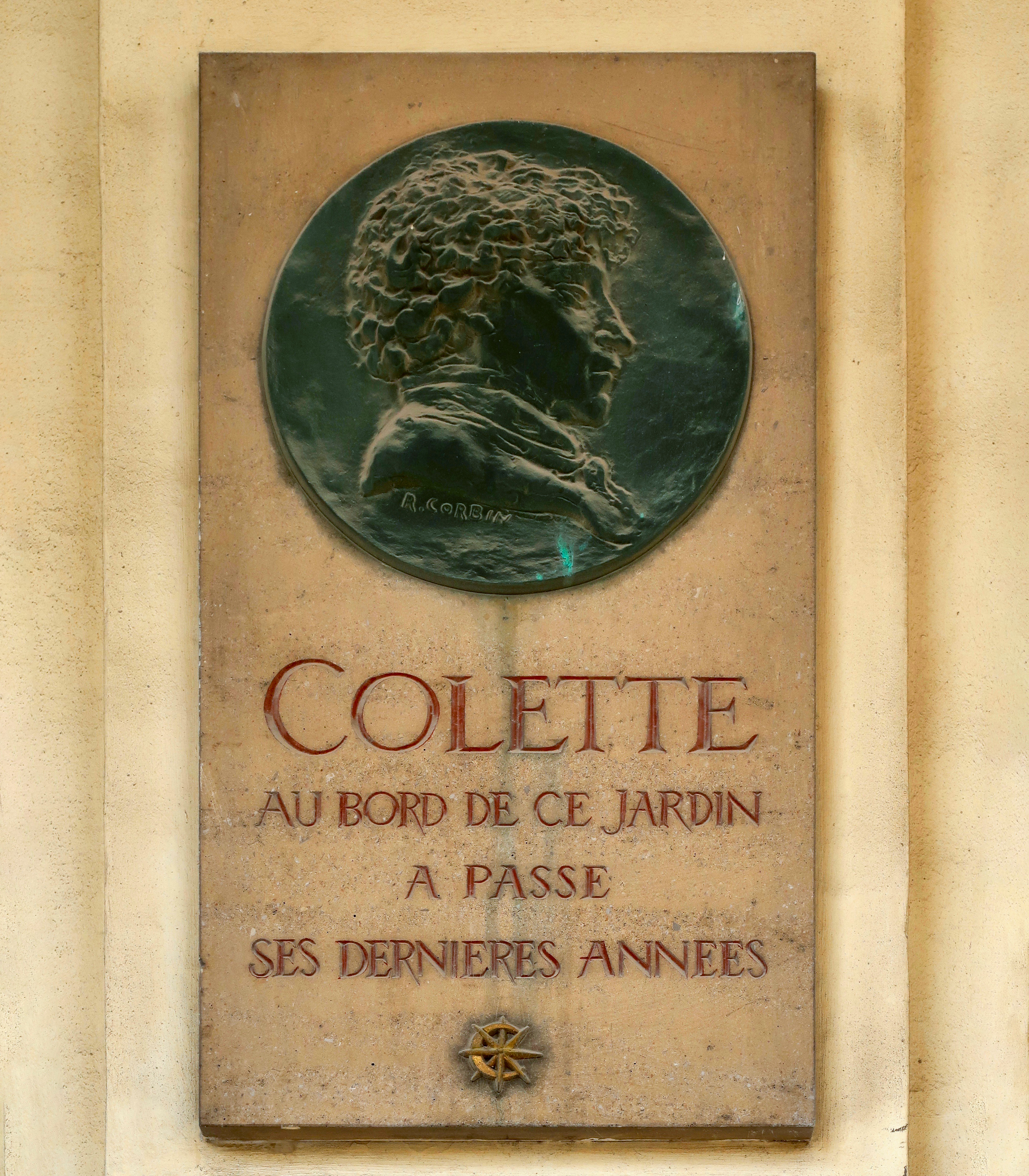 Plaque en hommage à Colette, Palais-Royal, passage du Perron (Paris, 1er).